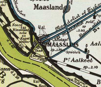 Sluispolder